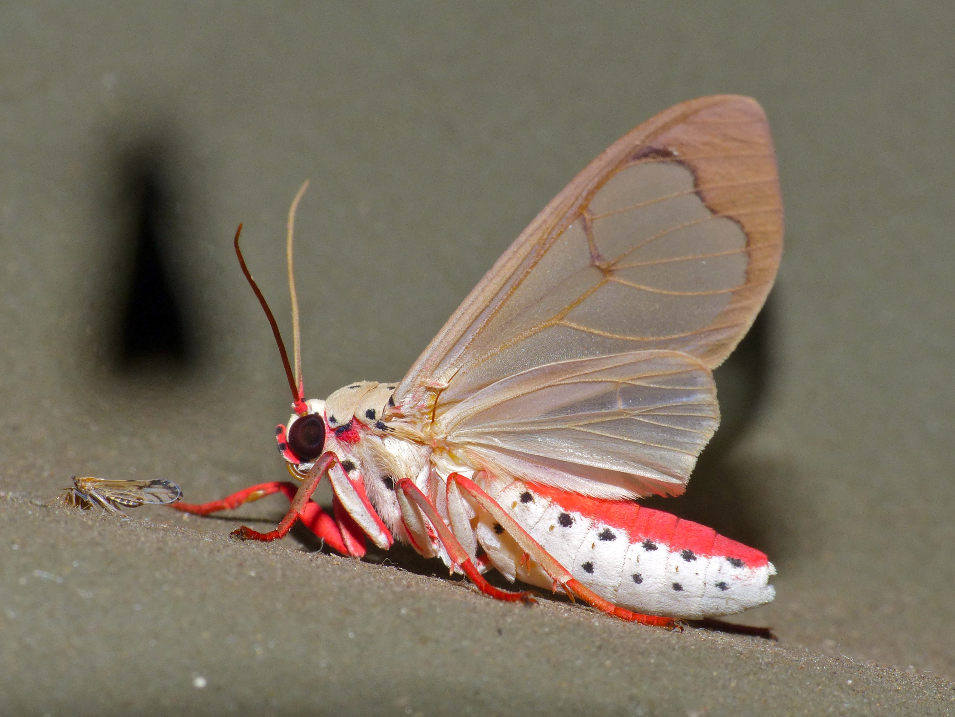 Safari Tent N°27, Tamboti Tented Camp, Kruger NP, SOUTH AFRICA